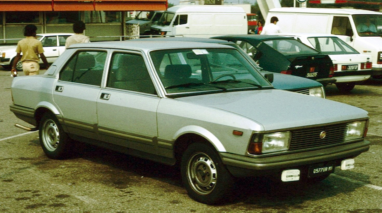 Fiat Argenta at Autostrada servizzio